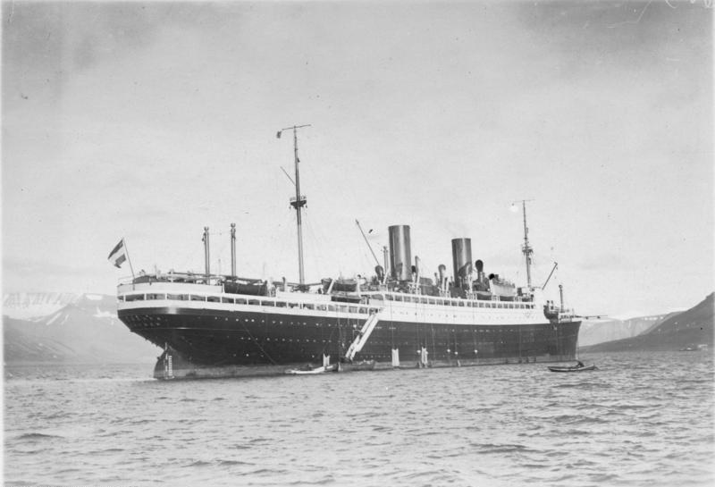 Polarfahrt mit dem Dampfer "München".- Die "München" im Hafen der Advent-Bay 17. Juli - 12. August 1925